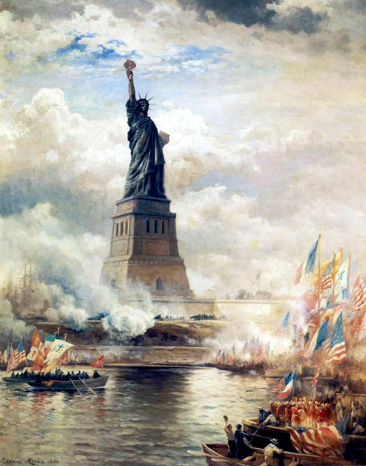 Statue of Liberty unveiledlabel QS:Lru,"Статуя Свободы, несущая свет миру"